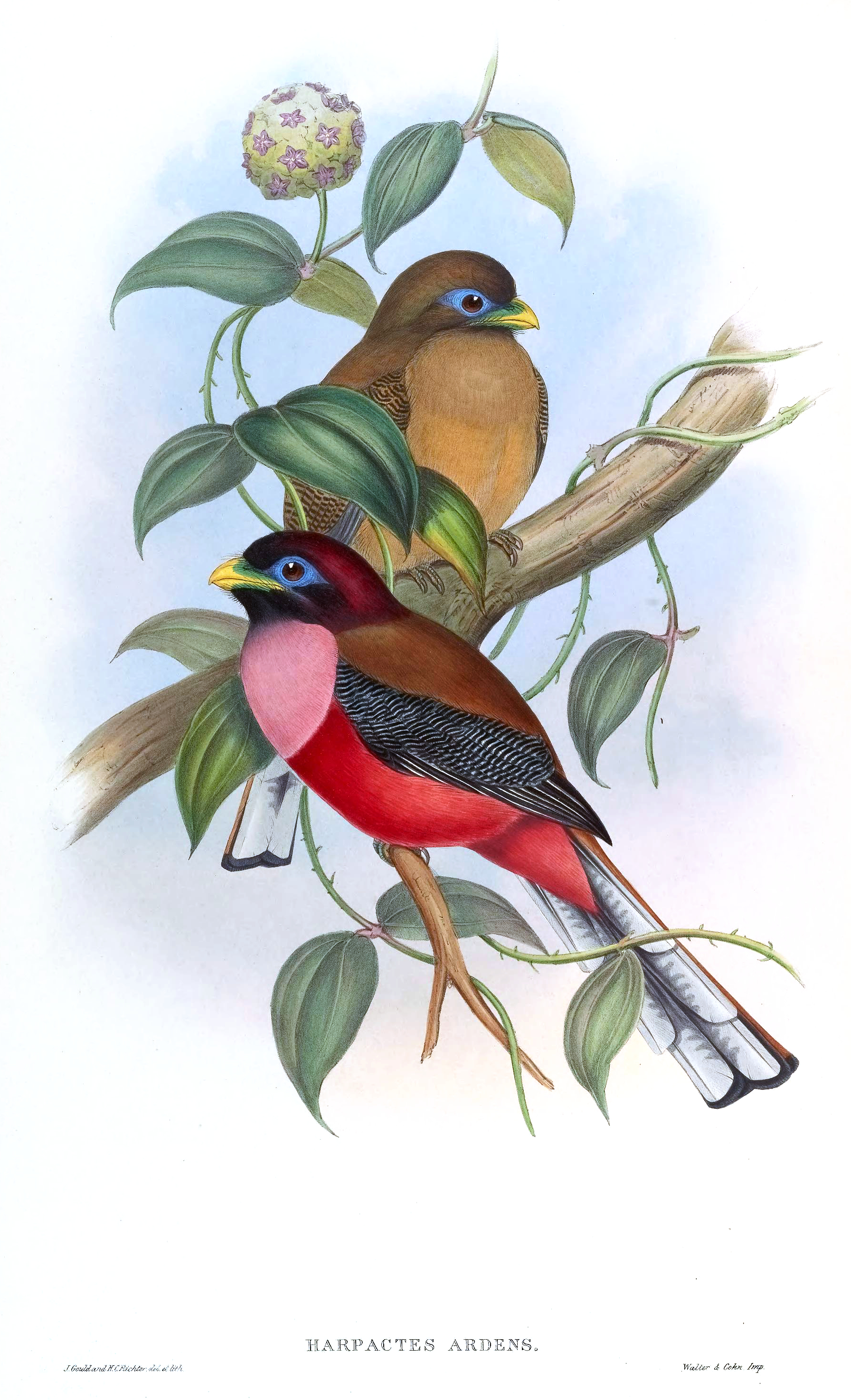 Harpactes ardens